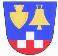 Znak Chudčic